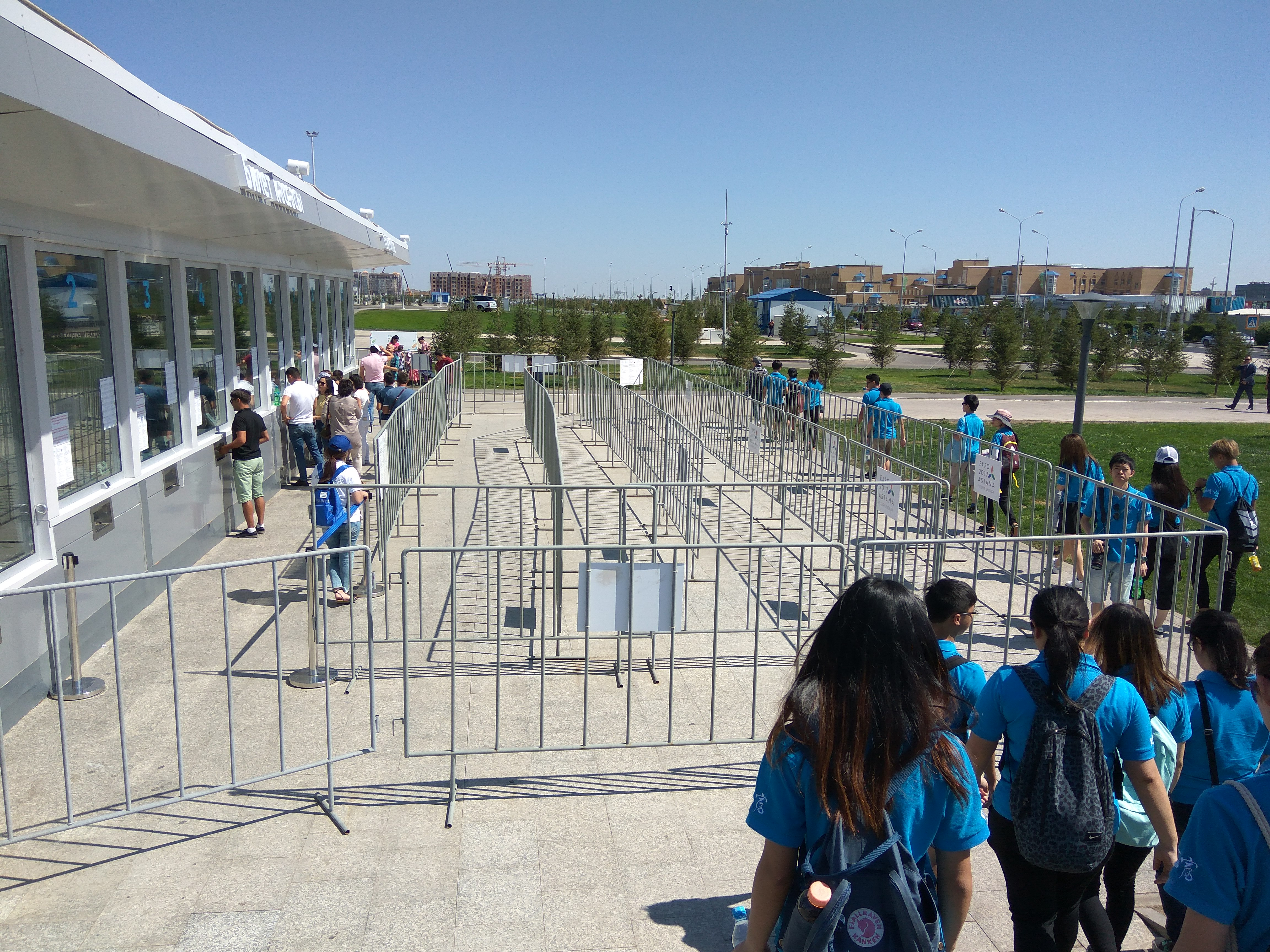 Ticket Office at the Expo 2017.